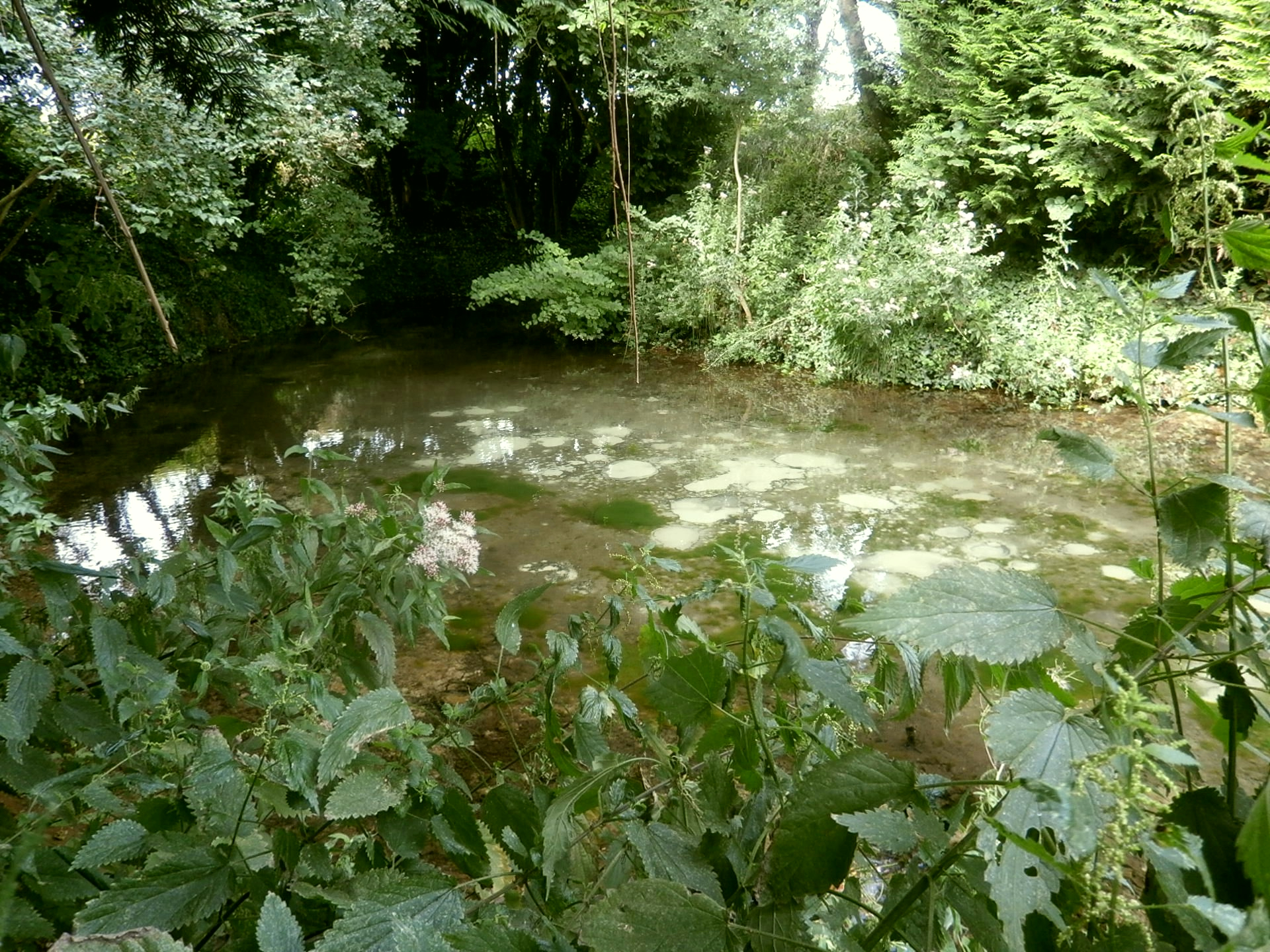 La source de Chenon, alimentant l'aqueduc conduisant au site de Cherré